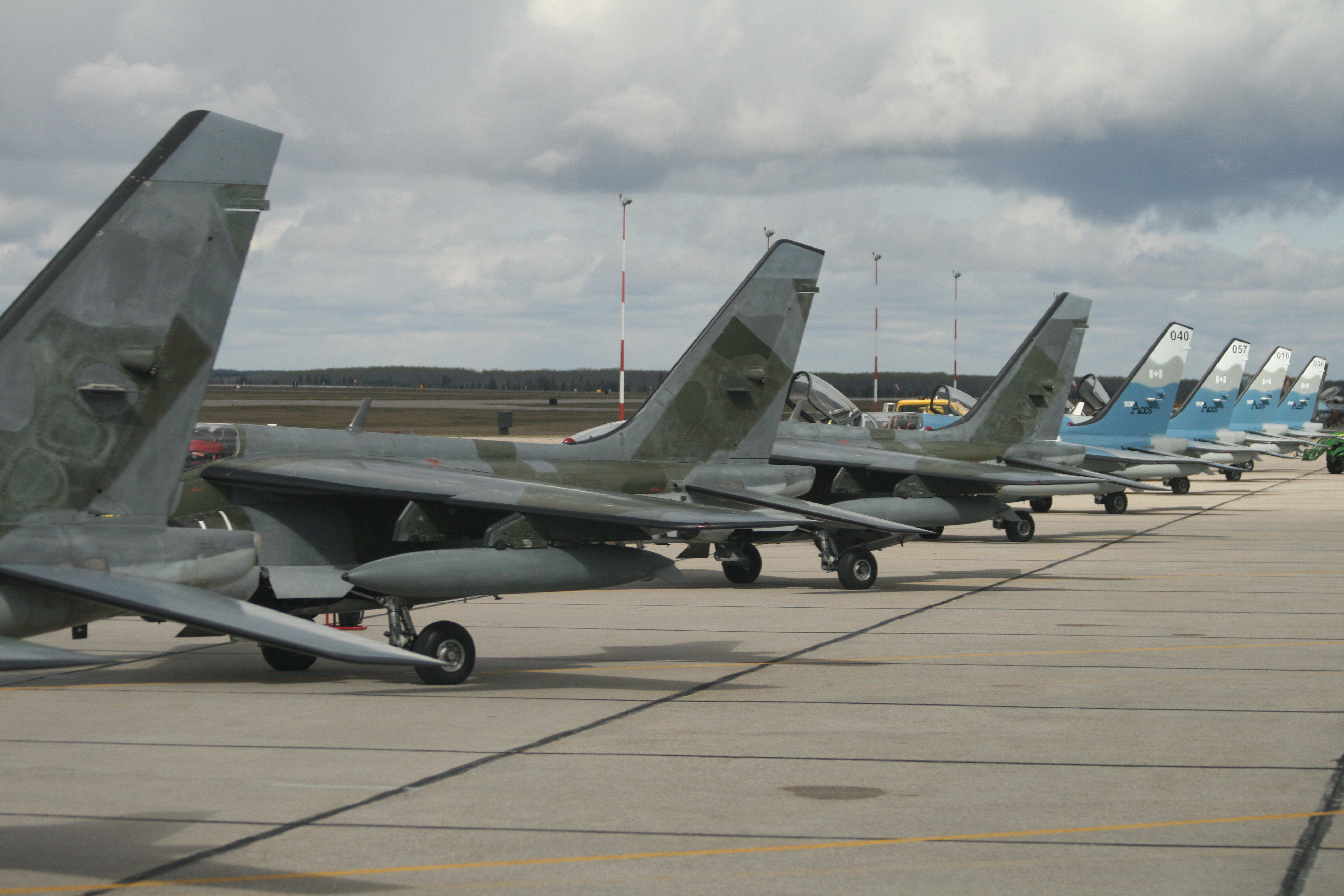 Top Aces Alpha Jet line up